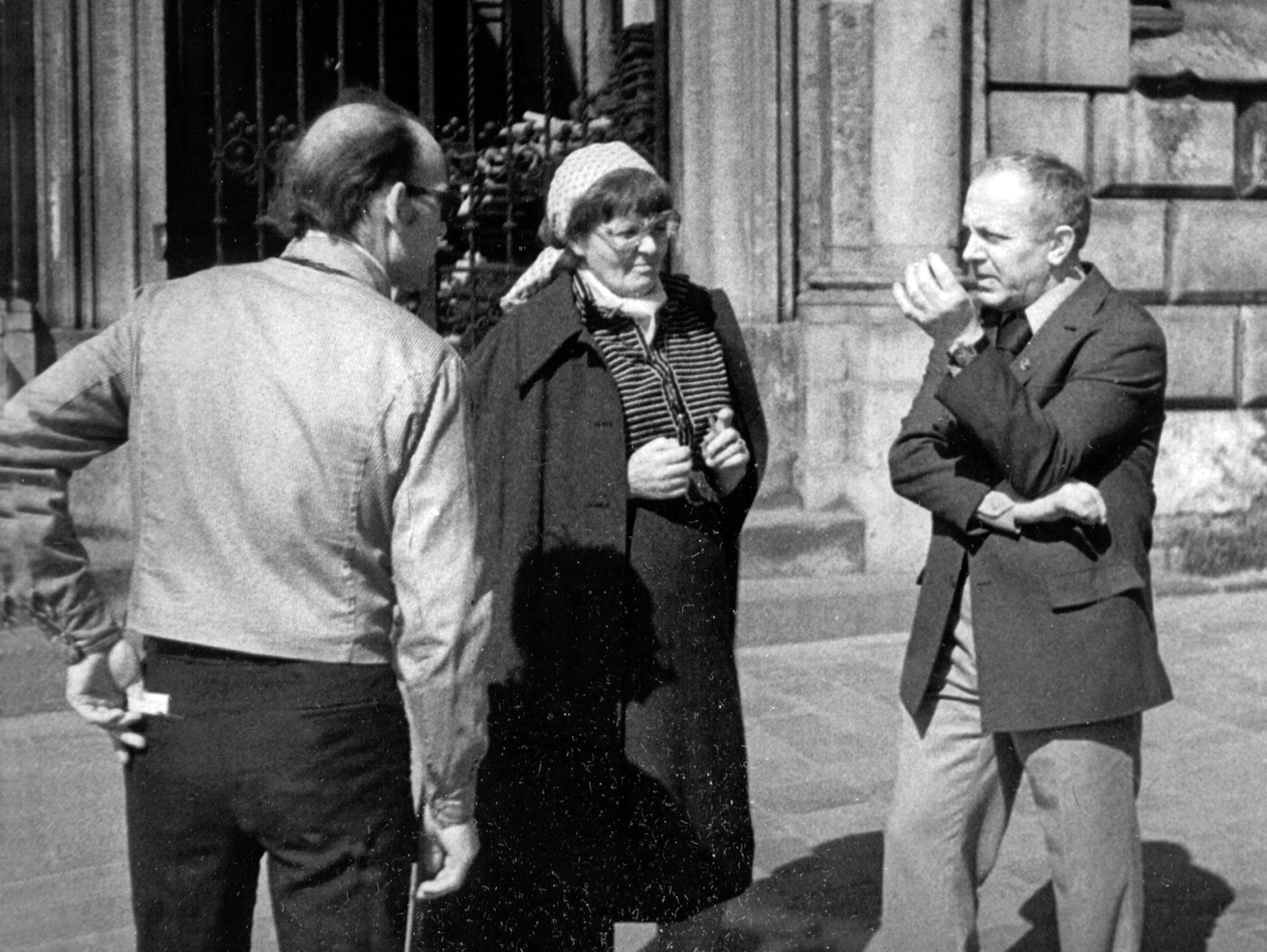 Fryderyk Kremser; działacz PTTK; portret z 1978 roku wykonany podczas VI Forum PTTK Kraków; autor Mirosław Z Wojalski.